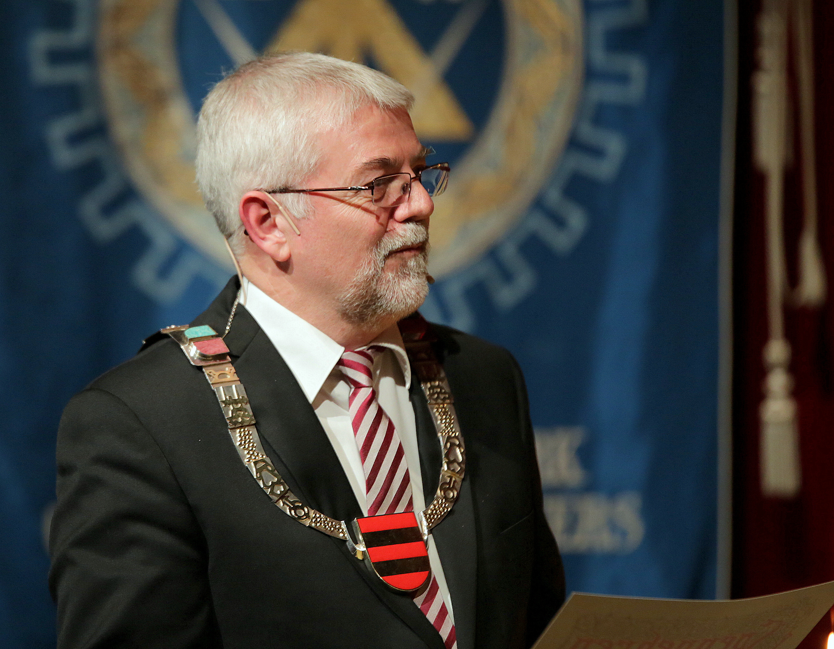 Fylkesvaraordfører Jon-Olav Strand delte ut fag- og svennebrev til over 200 personer som har fullført sin fagutdannelse og bestått. Foto: Jan Aabøe, AAFK